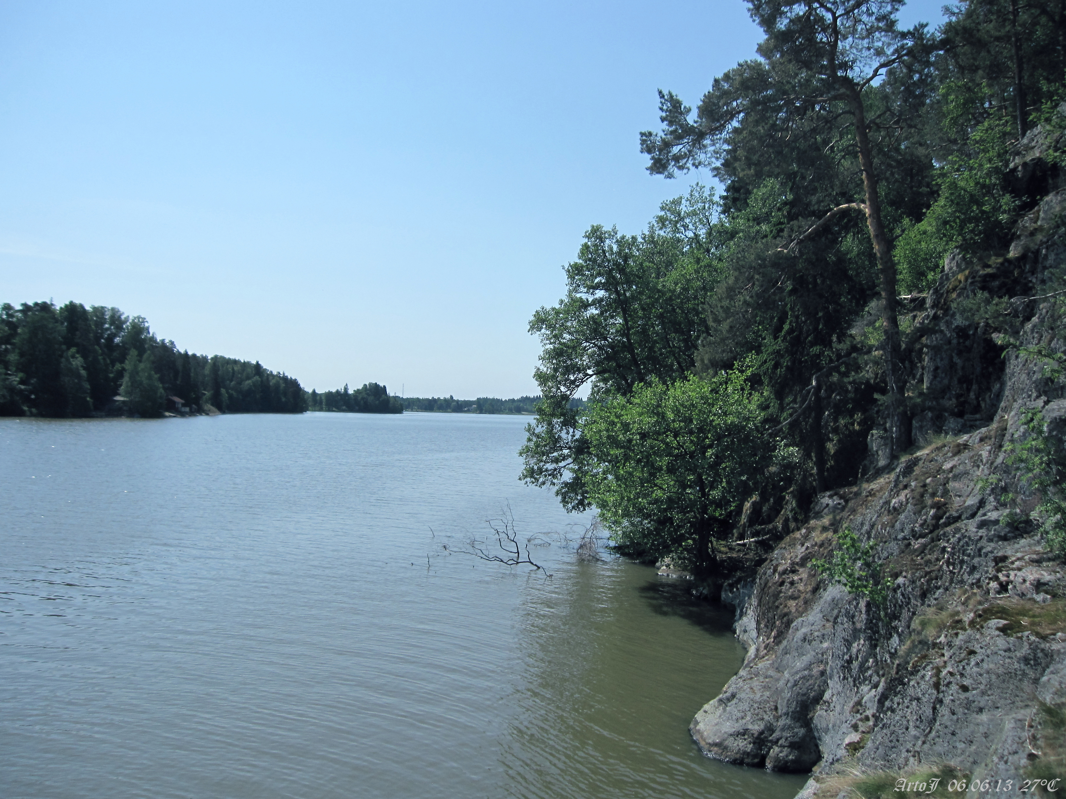 Tuusula - Sarvikallio Outdoor Recreation Area - Lake Tuusulanjärvi